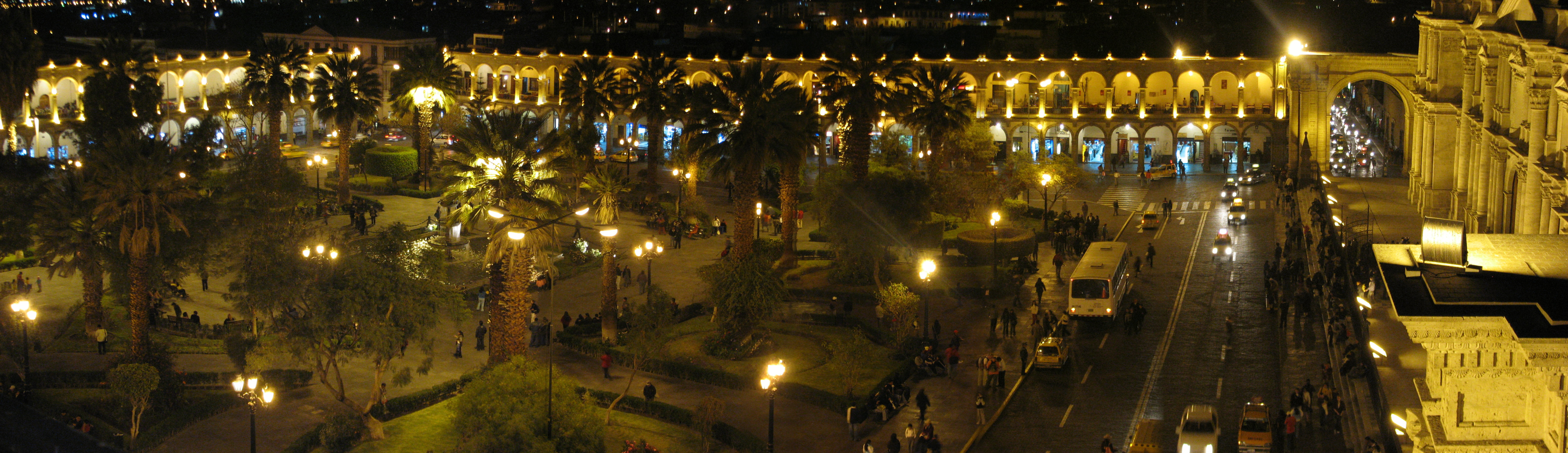 Plaza de Armas by night, Arequipa/Arequipa/Arequipa, Peru.